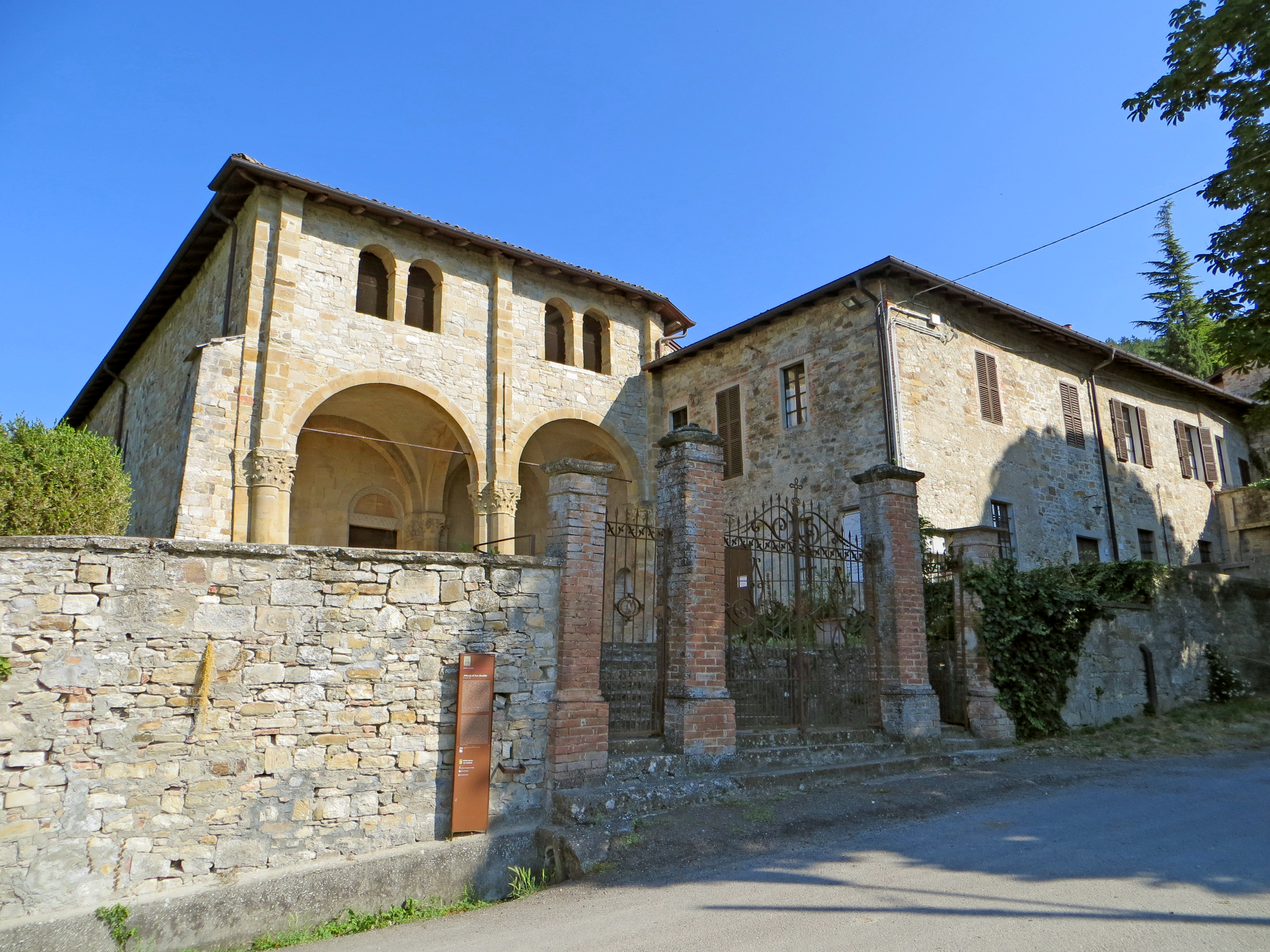 Abbazia di San Basilide (San Michele Cavana, Lesignano de' Bagni) - chiesa dei Santi Pietro e Paolo e canonica This is a photo of a monument which is part of cultural heritage of Italy.